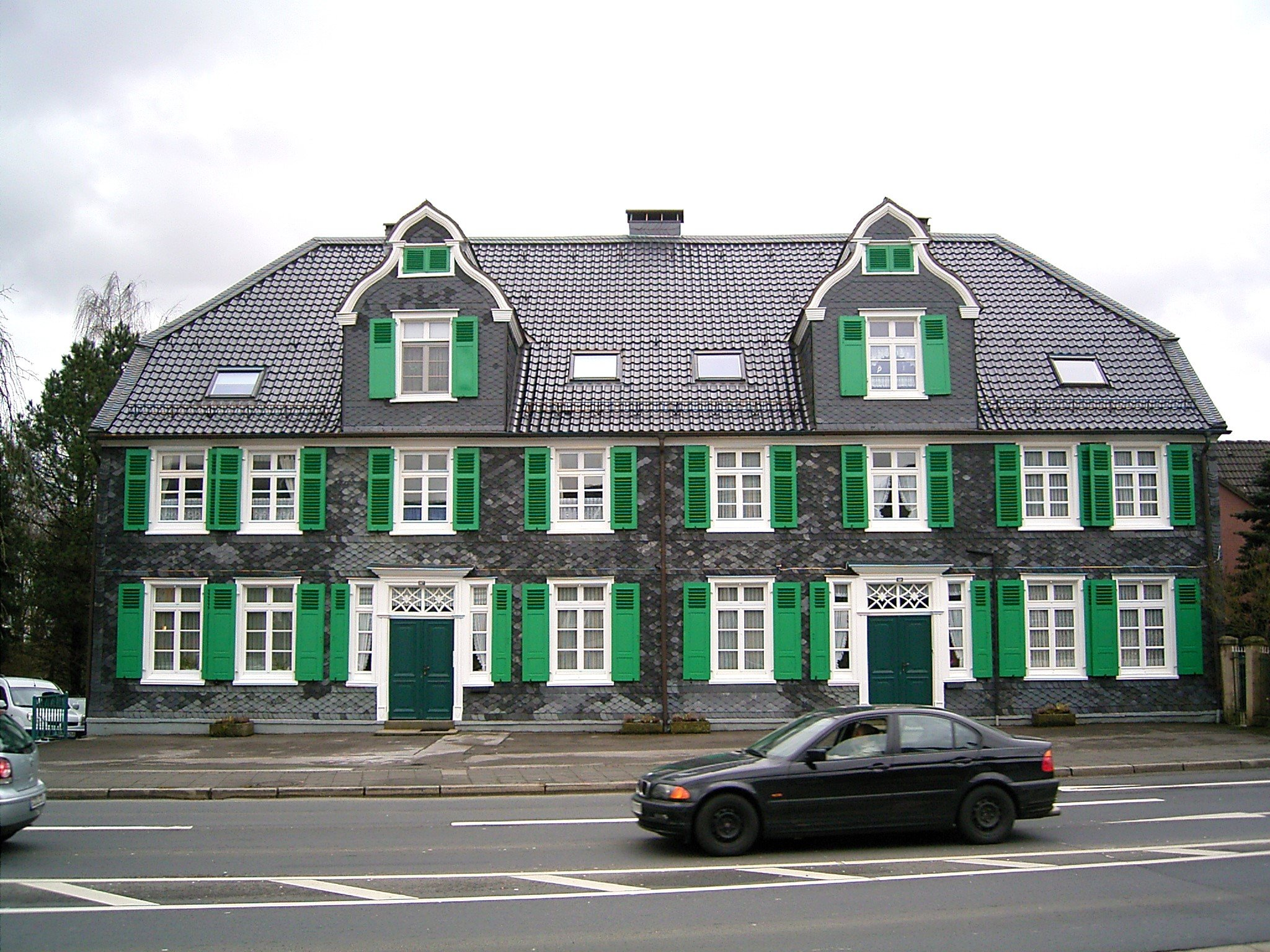 Remscheid - Bergisch Born